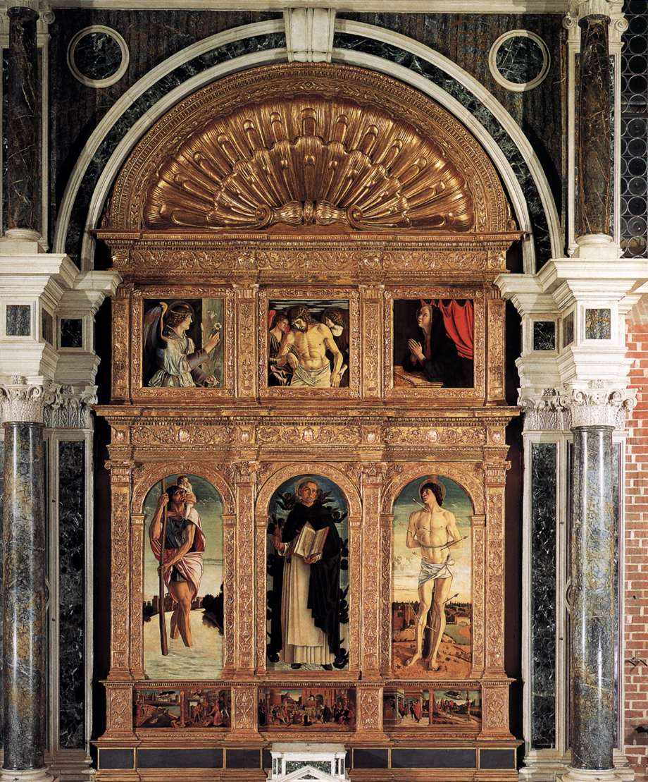 erhielt im 18.J. größere steinerne Rahmung als Gegenstück zum gegenüberliegenden Martyrium des hl. Petrus Martyr von Tizian, wofür die ursprüngliche Lynette mit Gottvater durch eine vergoldete halbrunde Muschel ersetzt wurde